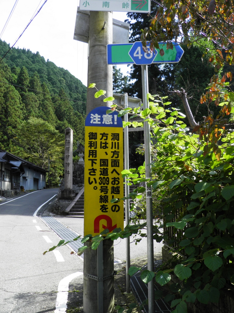 小南峠への入口。国道309号線への迂回を促す看板（奈良県吉野郡黒滝村川戸）